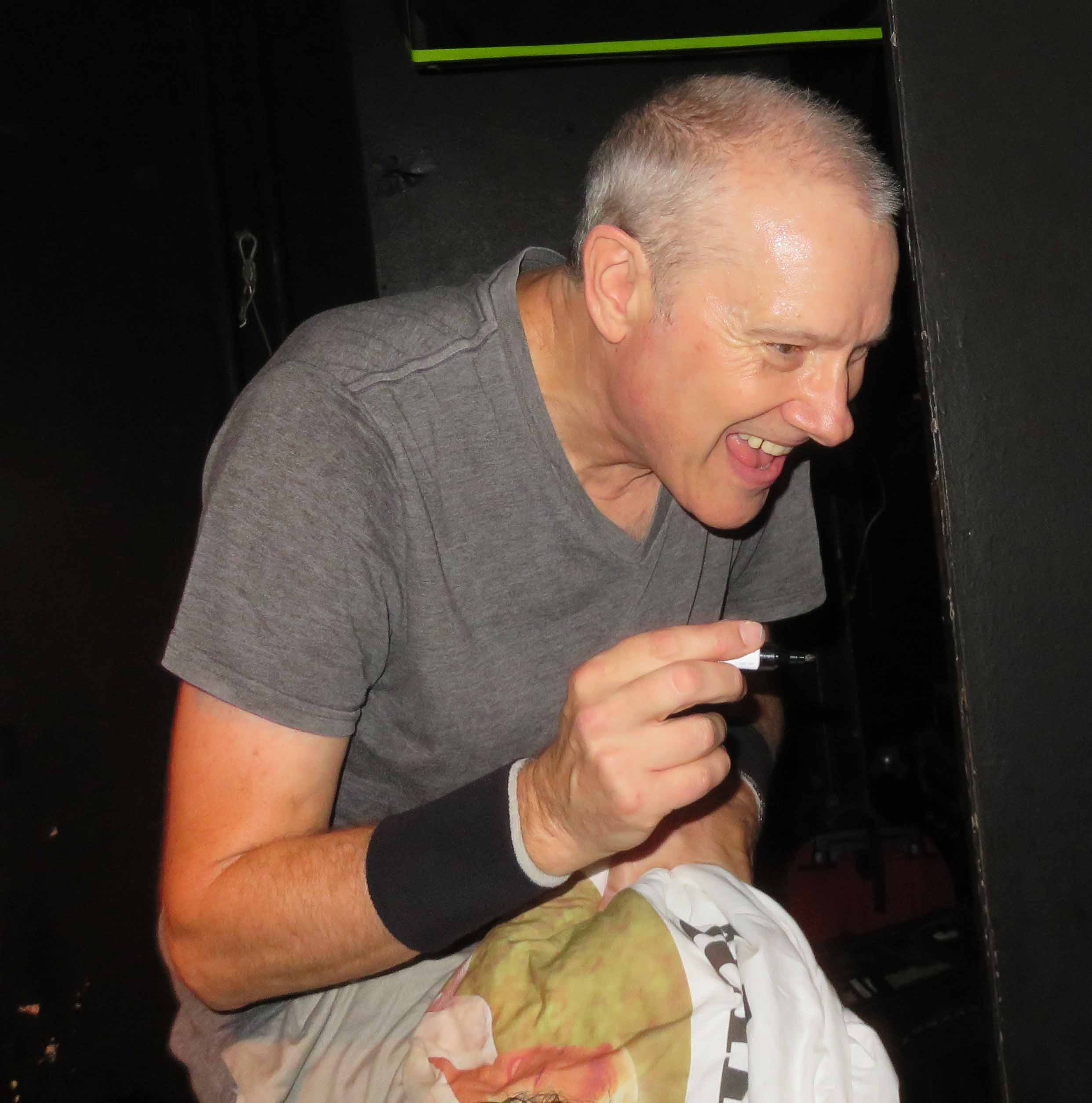 Alternative-Rock-Musiker Page Hamilton nach einem Konzert von Helmet im Rahmen der Jubiläumstour 30 Years x 30 Cities x 30 Songs anlässlich des 30-jährigen Bestehens der Band im Zoom-Club in Frankfurt am Main Depicted person: Q1347326